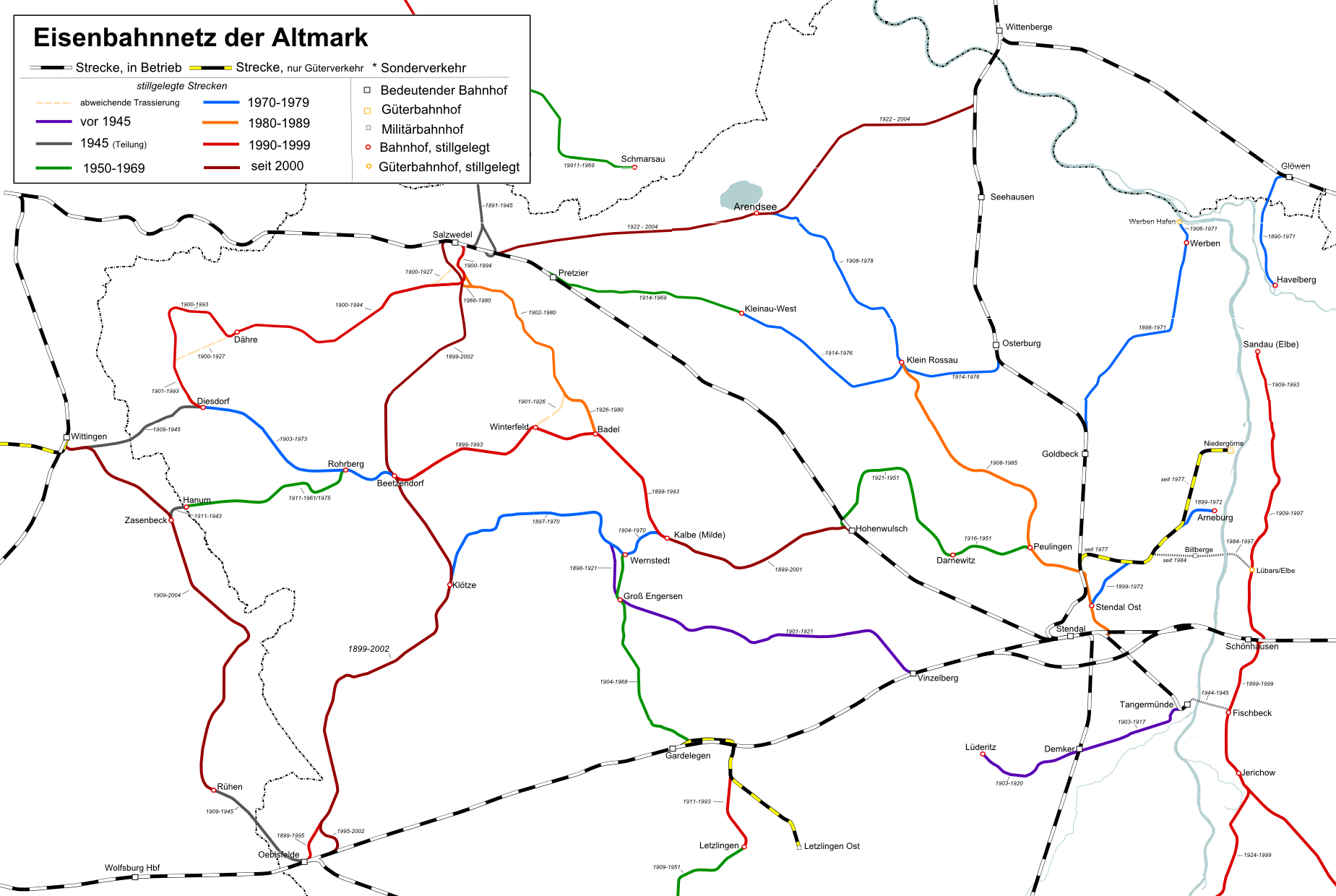 Überblick über das weit verzweigte Eisenbahnnetz der Altmark. Die Karte ist nach dem Stilllegungsdatum sortiert.